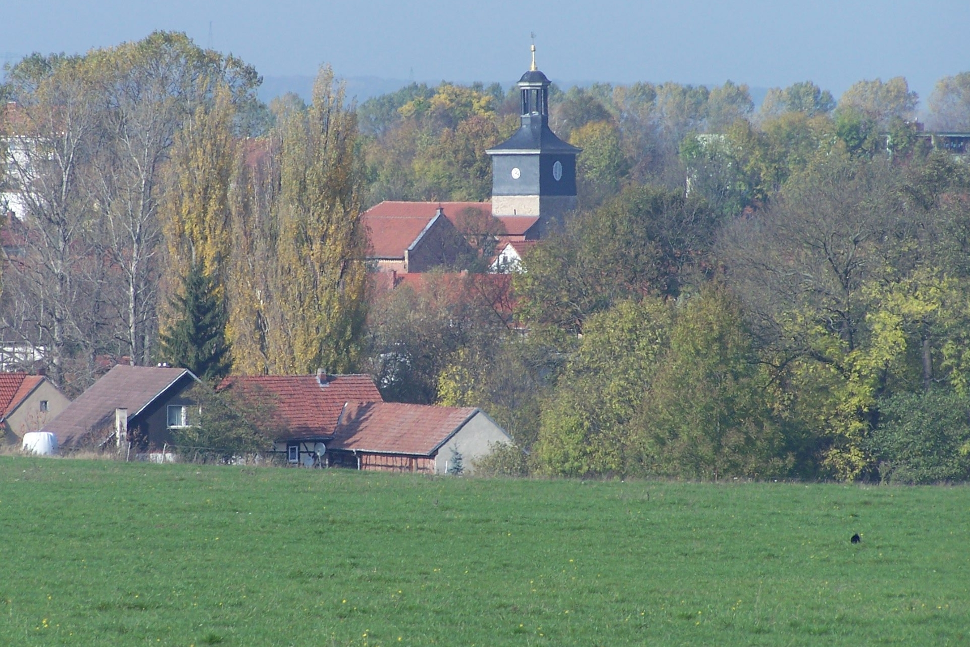 Ansicht der Kirche von Südosten.